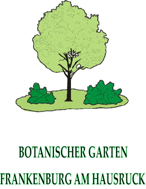 Logo unseres Botanischen Gartens